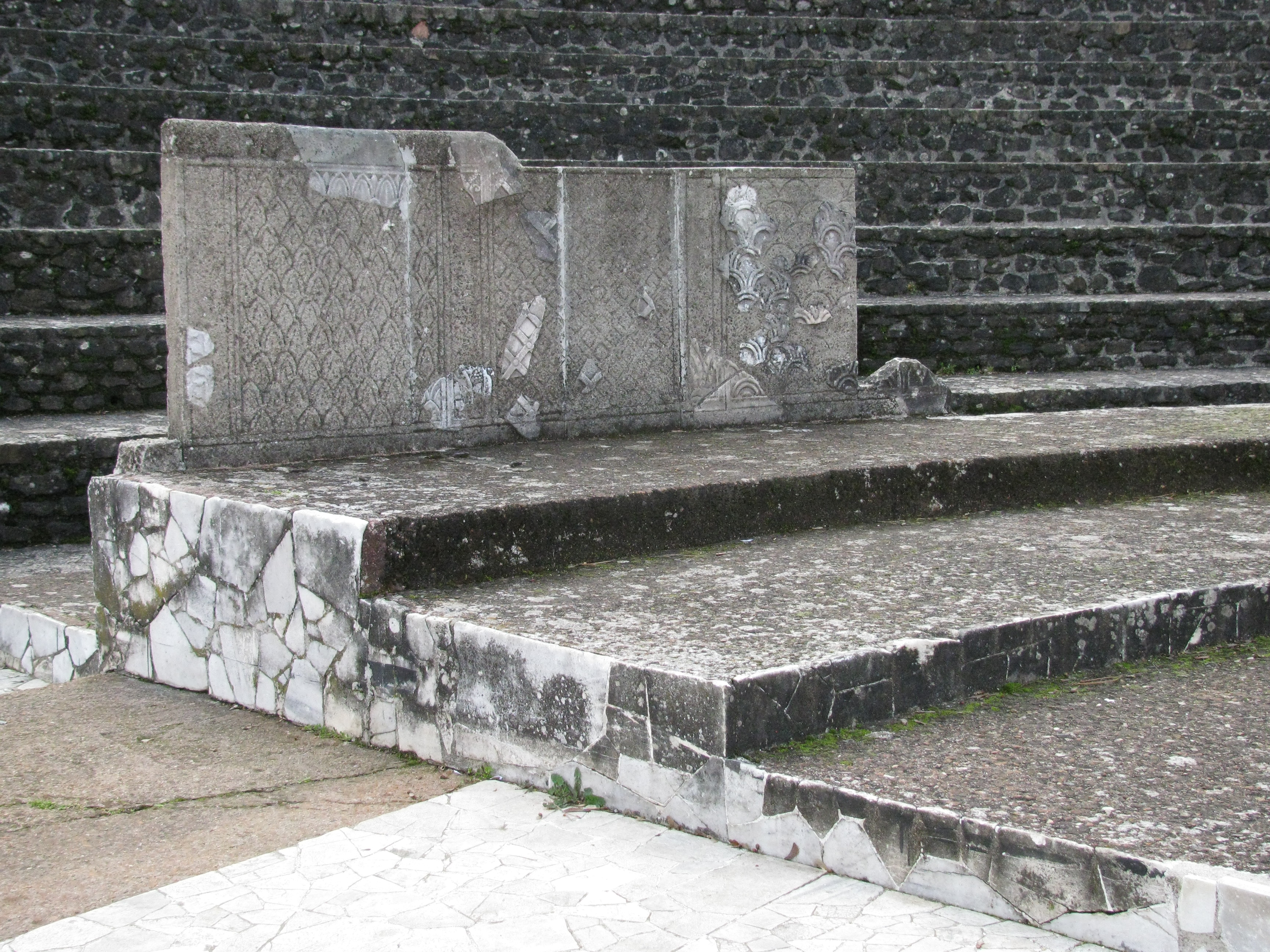 Odéon antique de Lyon. Portion de Balteus (86 cm de haut) bordant l'orchestre, reconstituée à partir de 24 fragments de décoration en marbre blanc découvert avant 1951. Motifs date du début des Antonins. Inventaire du musée gallo-romain N° 2001-0-415